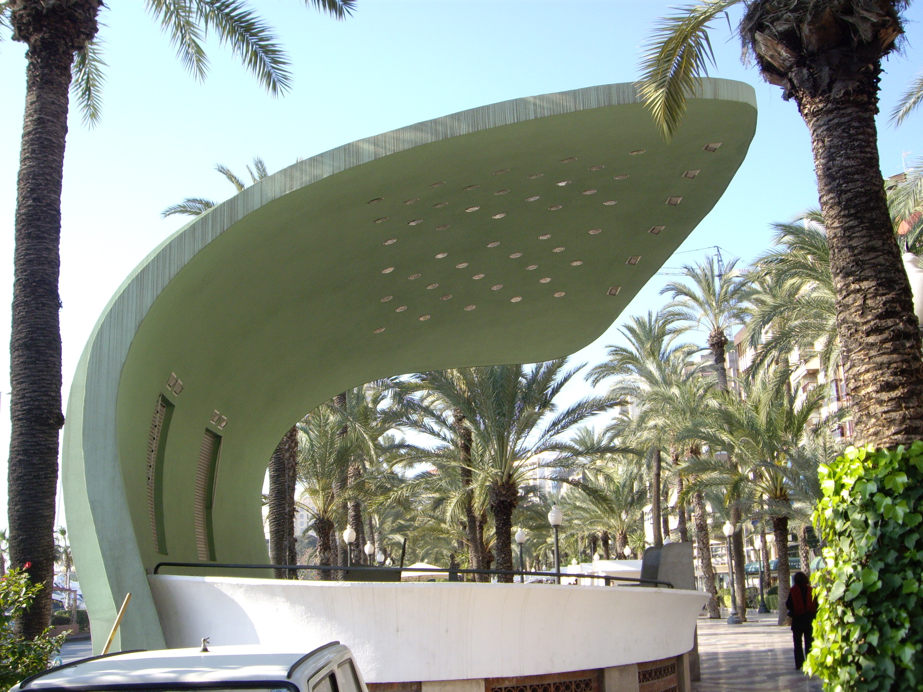 Quiosc de l'Esplanada